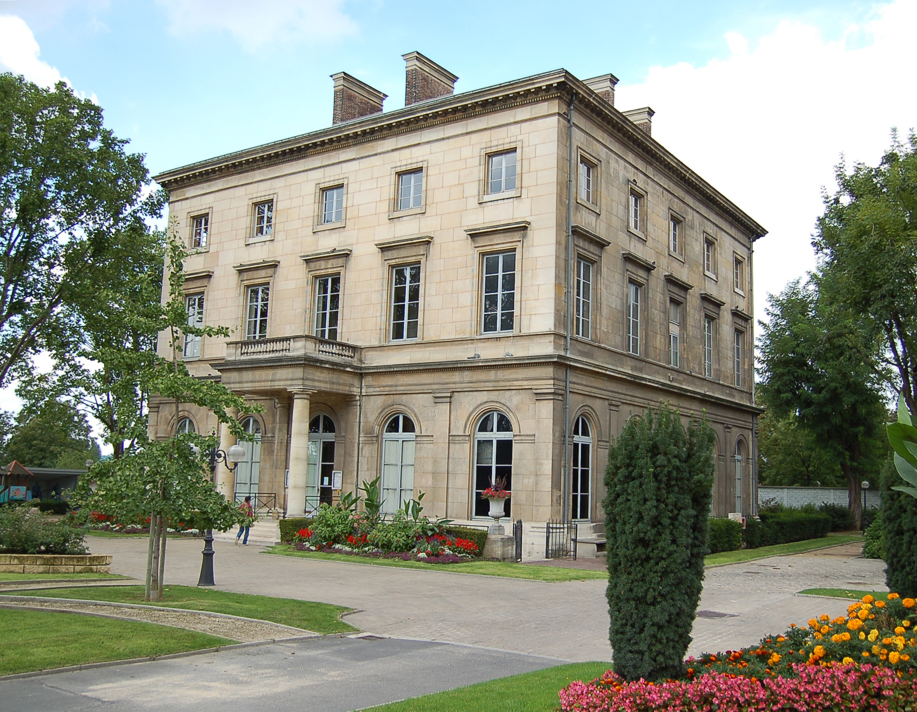 Le château de Saint Ouen - Saint Ouen Castle